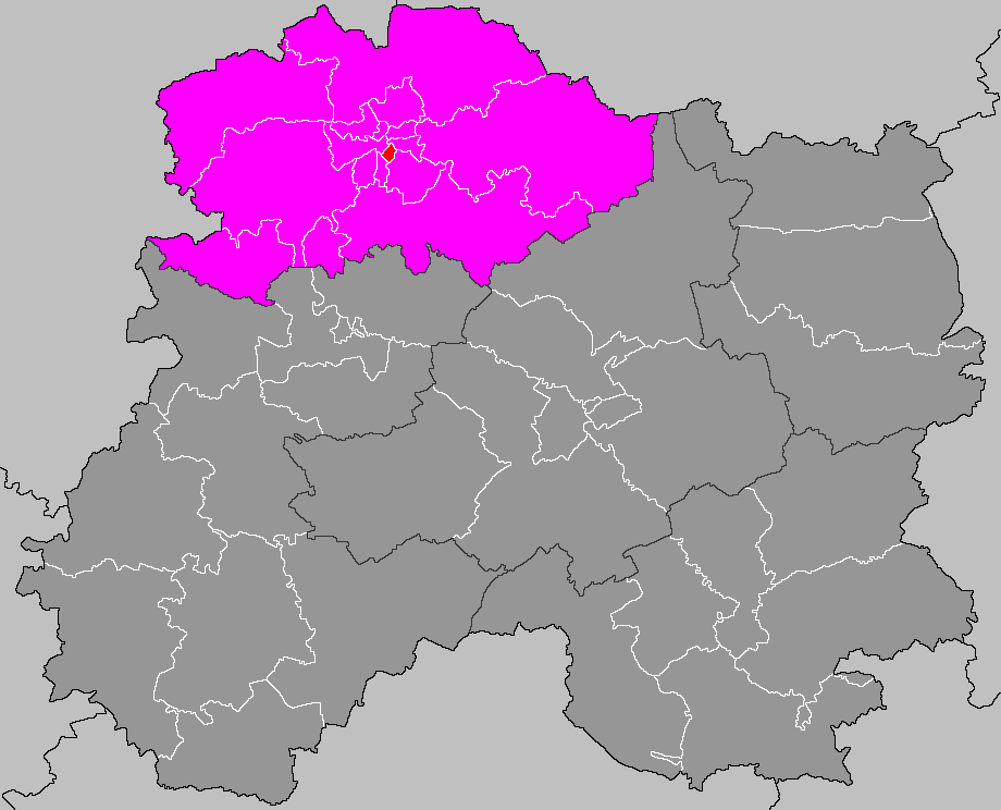 Localisation du canton de Reims-3